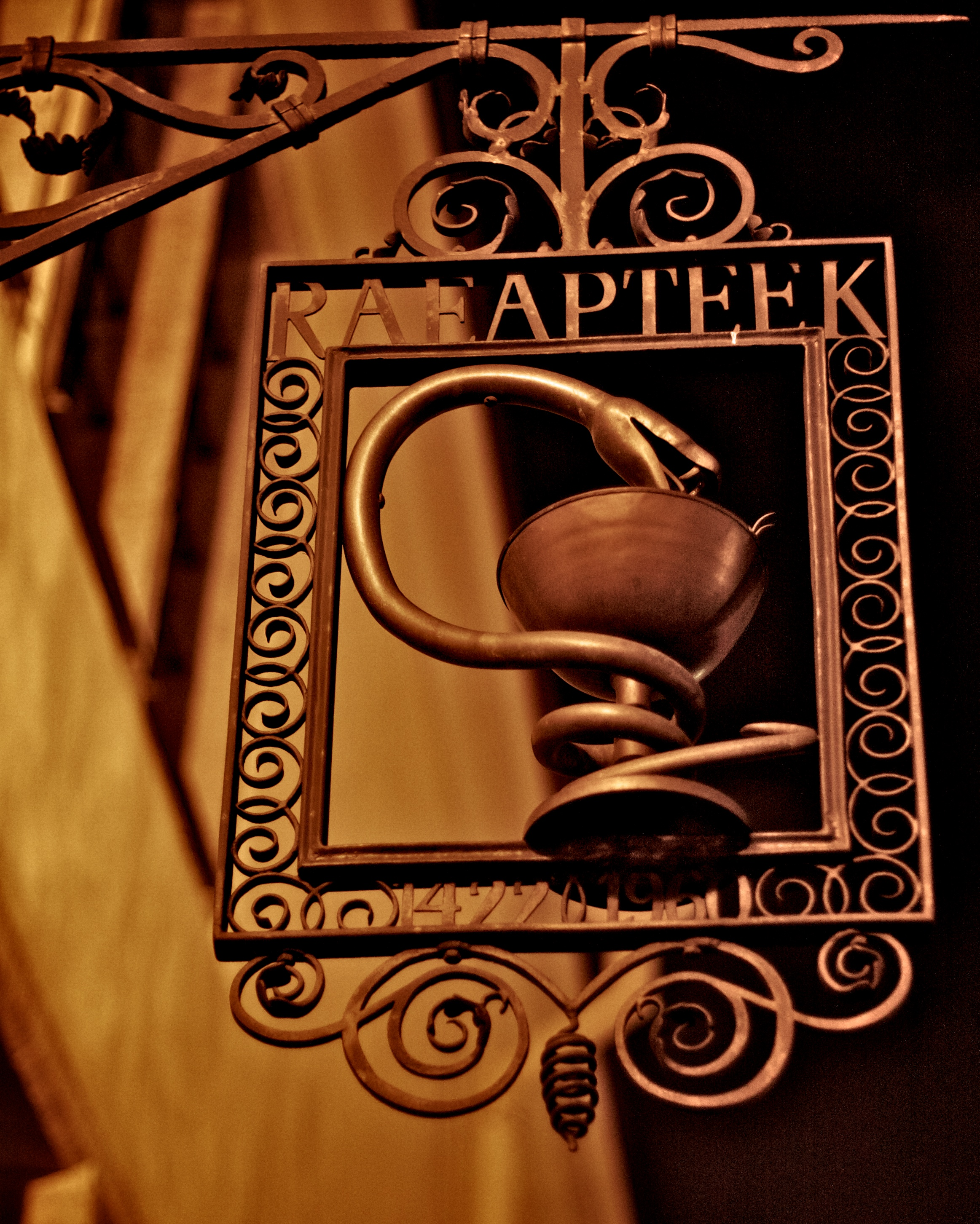 Tallinna Raeapteek